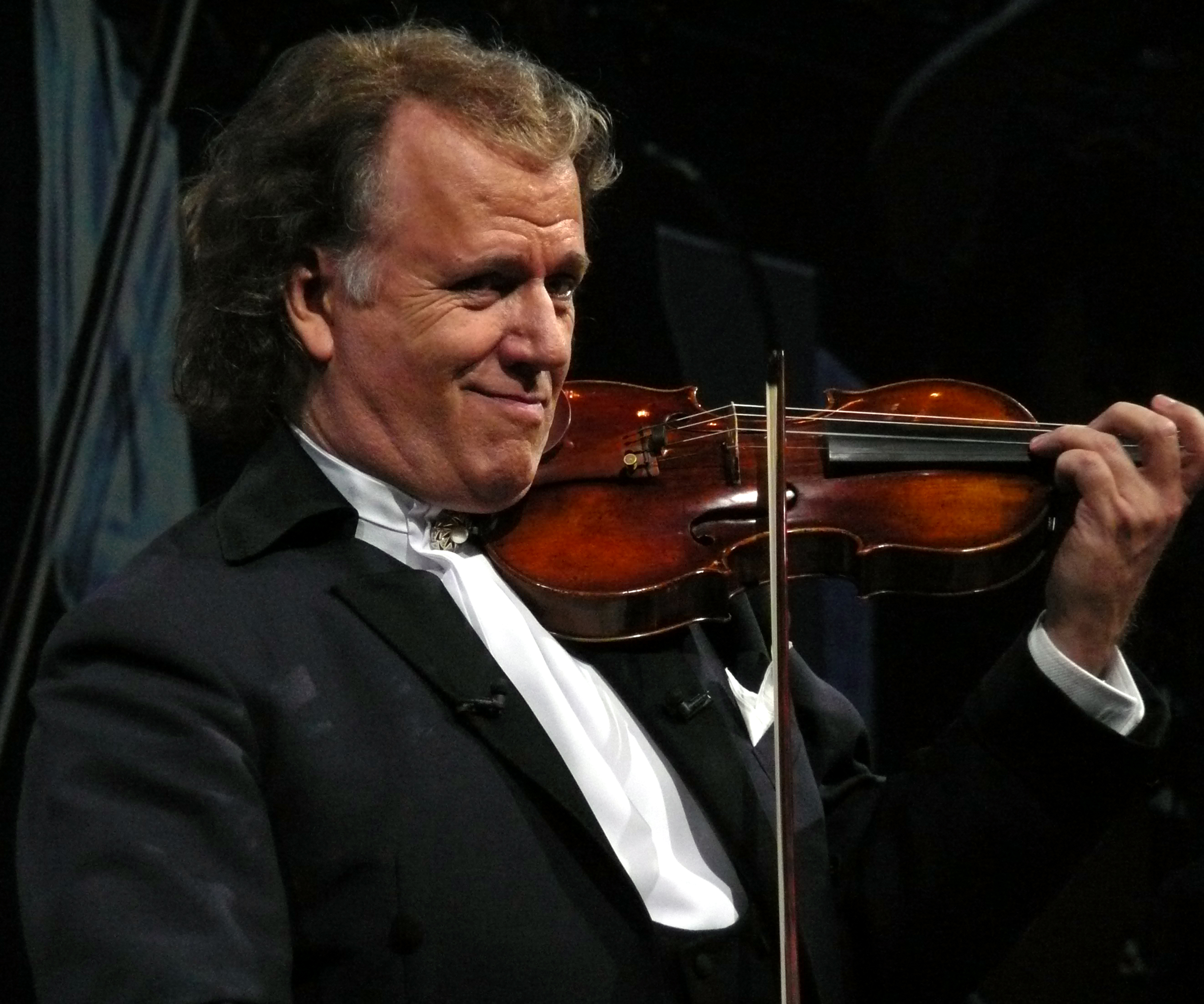 Andre Rieu bei seinem Kölner Konzert am 02.01.2010